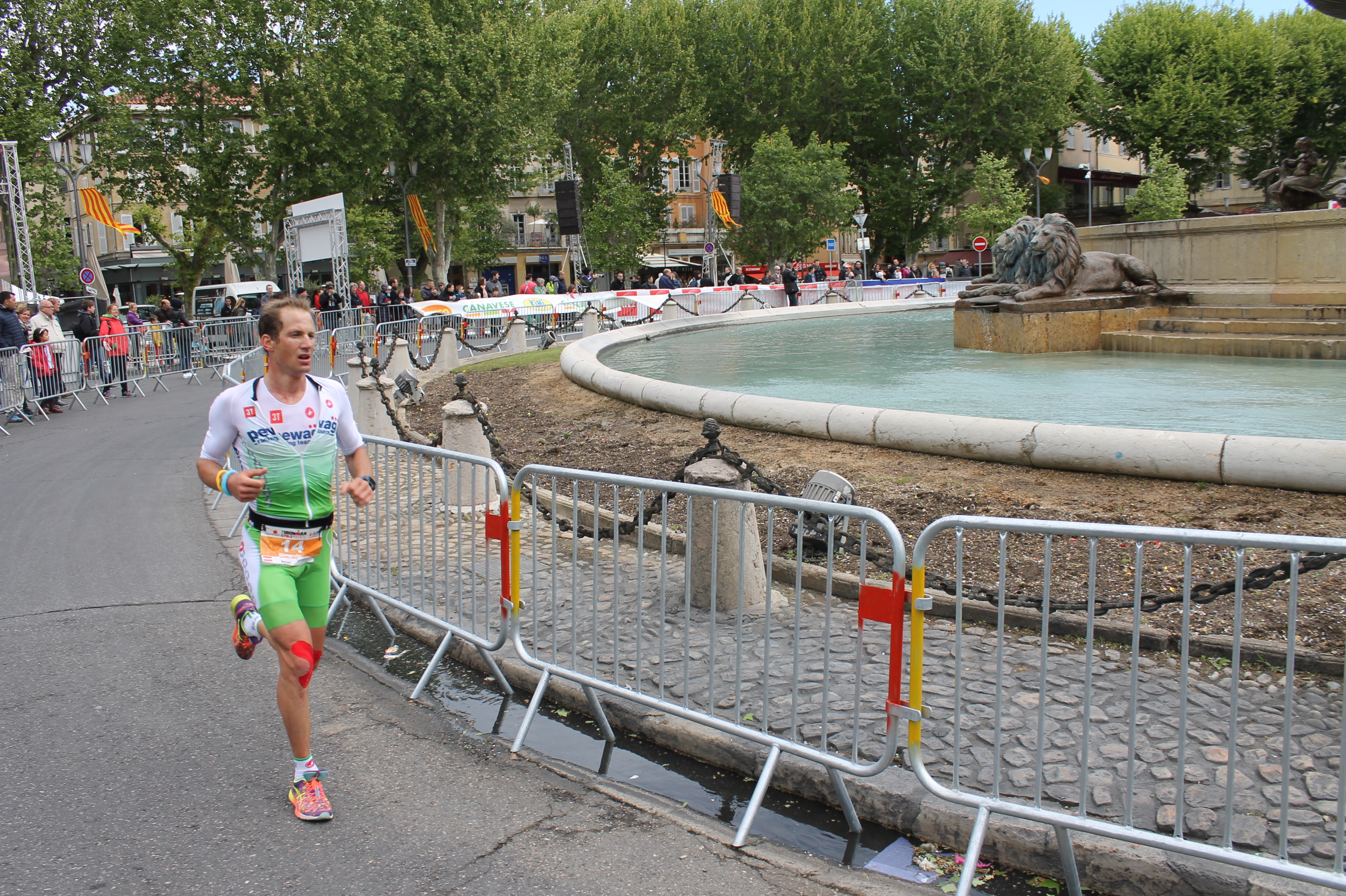 Christian Birngruber IMPA 2016